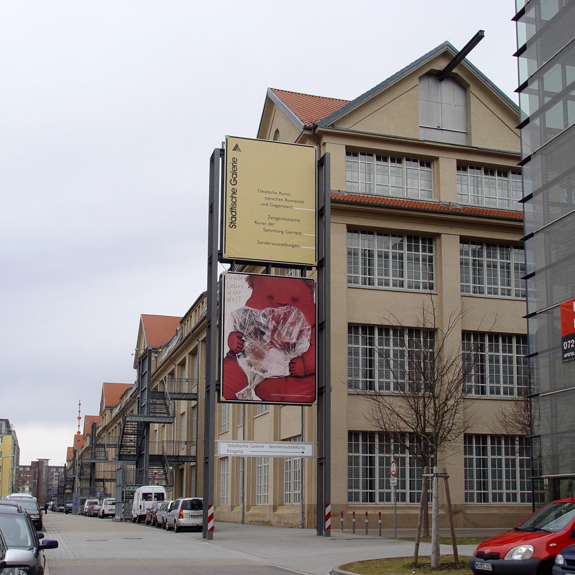 Fotografiert von Martin Dürrschnabel Datum 19.02.2006 Kamera: Sony DSC F717 Städtische Galerie Karlsruhe Datum 19.02.2006